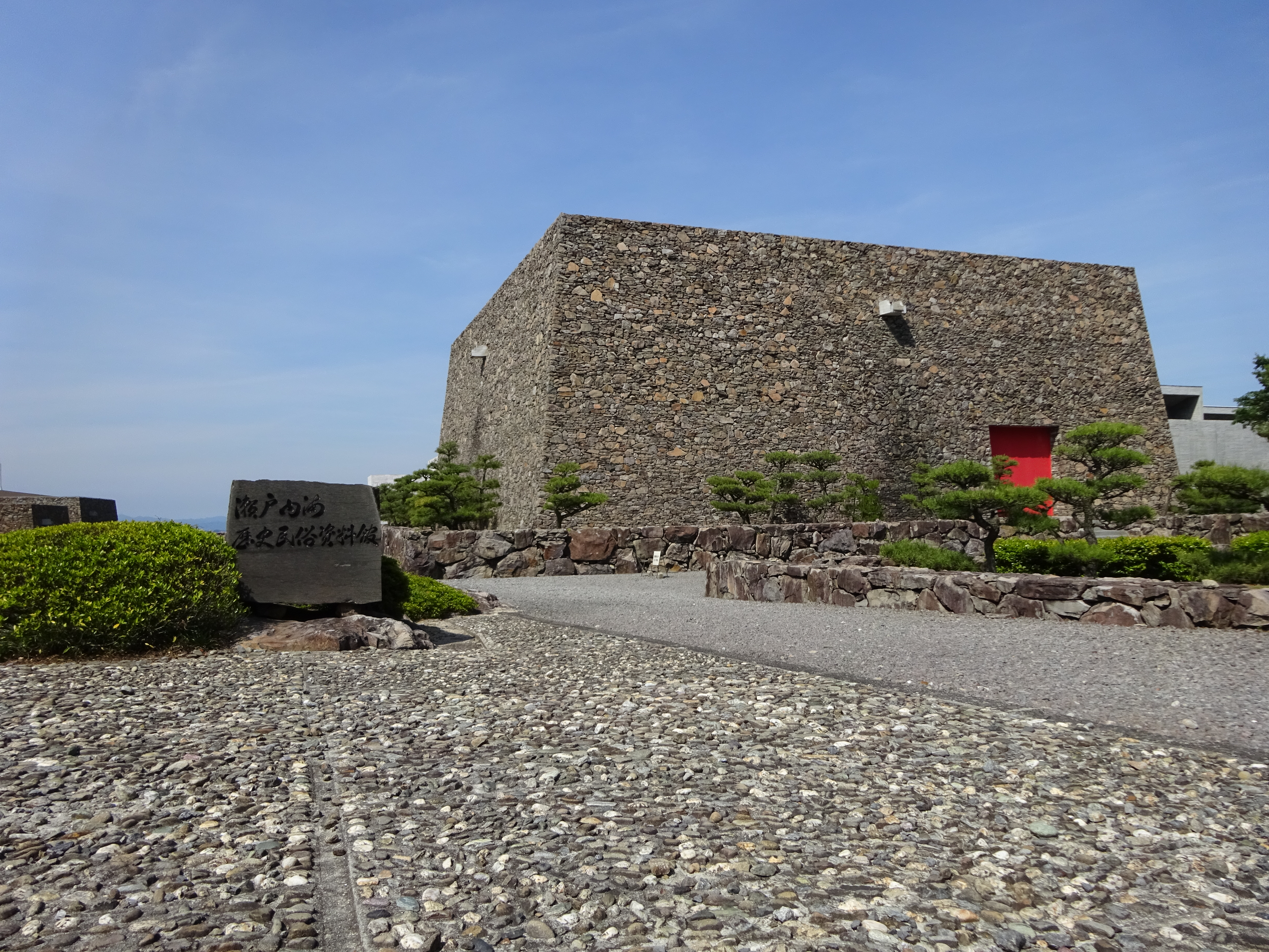 五色台の瀬戸内海歴史民俗資料館の外観